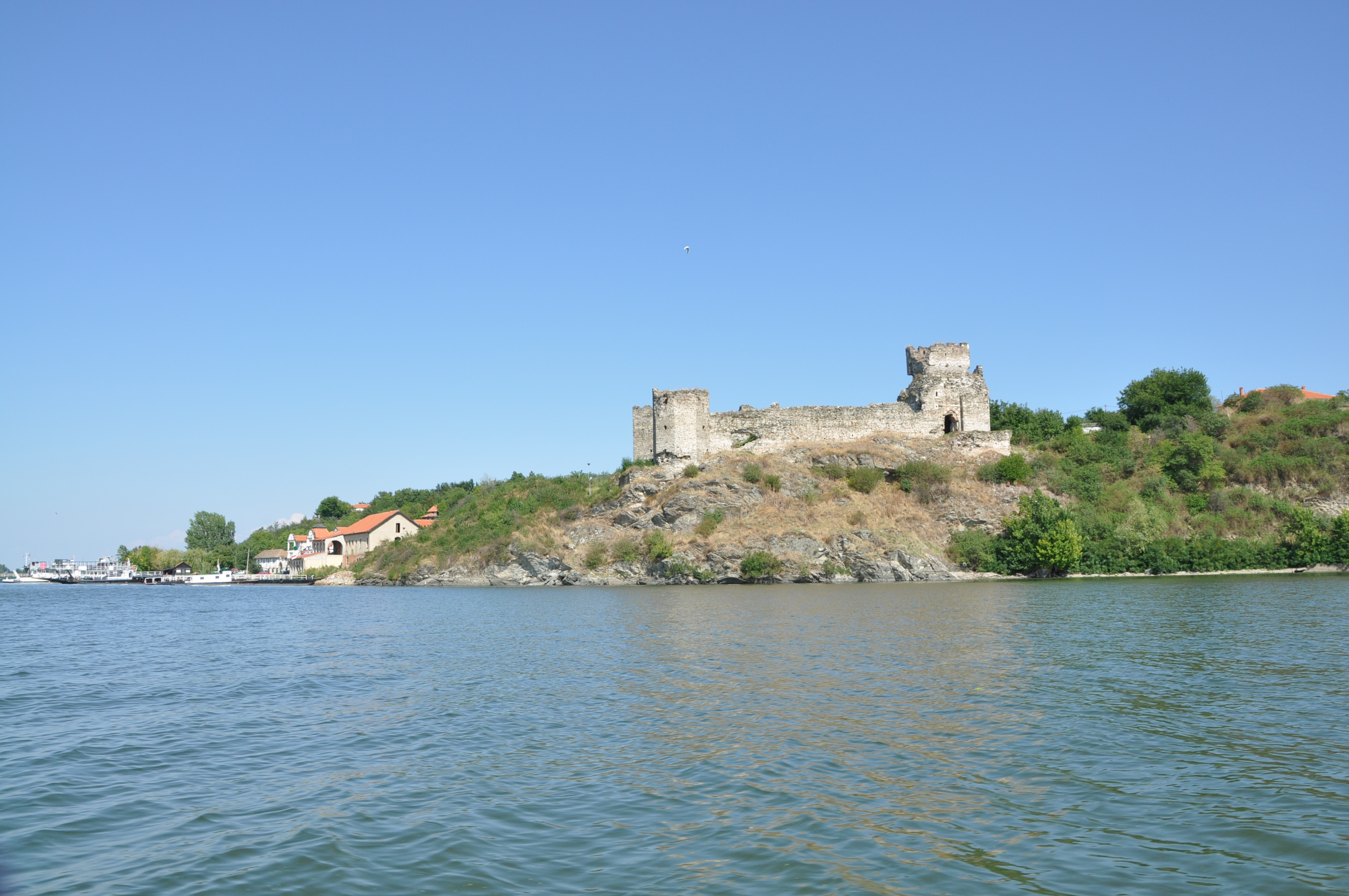 Тврђава Рам